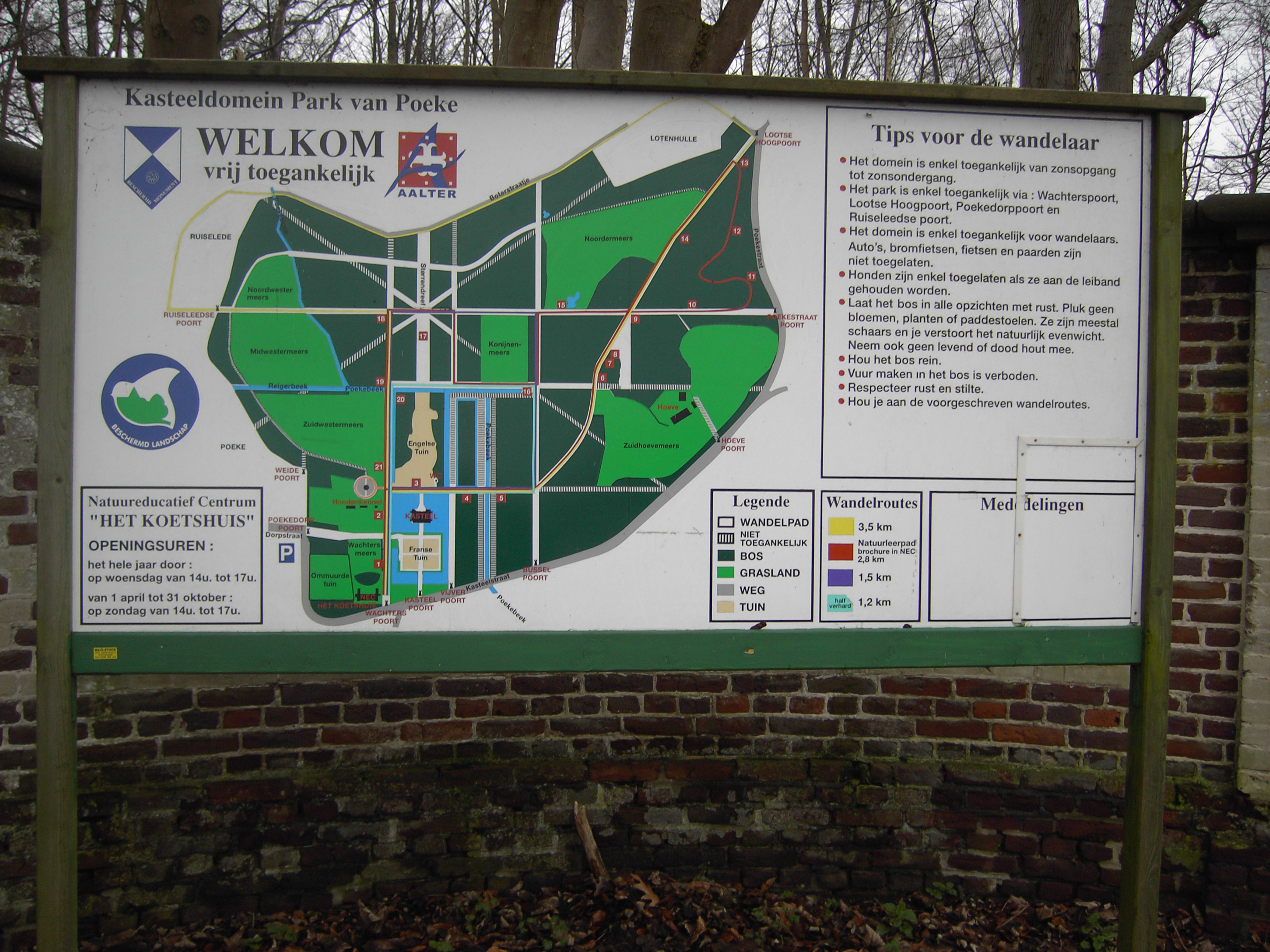 Lotenhulle en Poeke (Aalter) - situatieplan van het kasteeldomein Poeke.